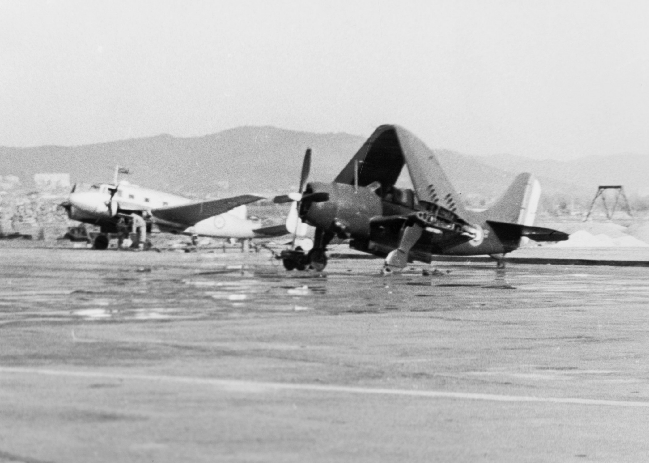 A French Aéronavale Curtiss SB2C-5 Helldiver at the Base d'aéronautique navale d'Hyères Le Palyvestre near Toulon. A SNCAC NC.702 Martinet is visible in the background.